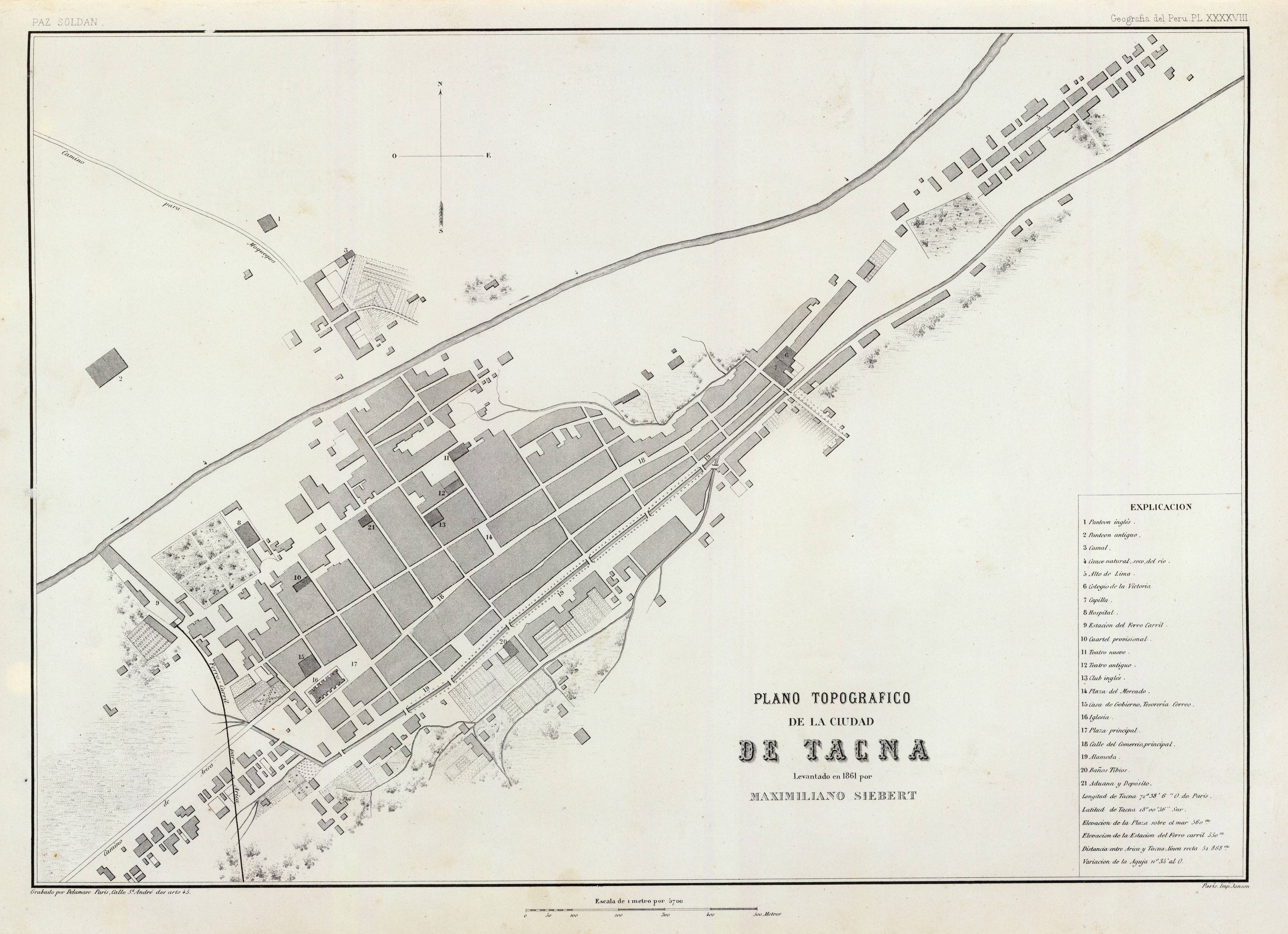 Plano topografico de la Ciudad de Tacna. Levantado en 1861 por Maximiliano Siebert. Paz Soldan. Geografia del Peru. Grabado por Delamare, Calle St. Andre des Arts, 45, Paris. Paris, Imp. Janson, Calle Antne. Dubois, 6. (Paris, Libreria de Augusto Durand, 1865)